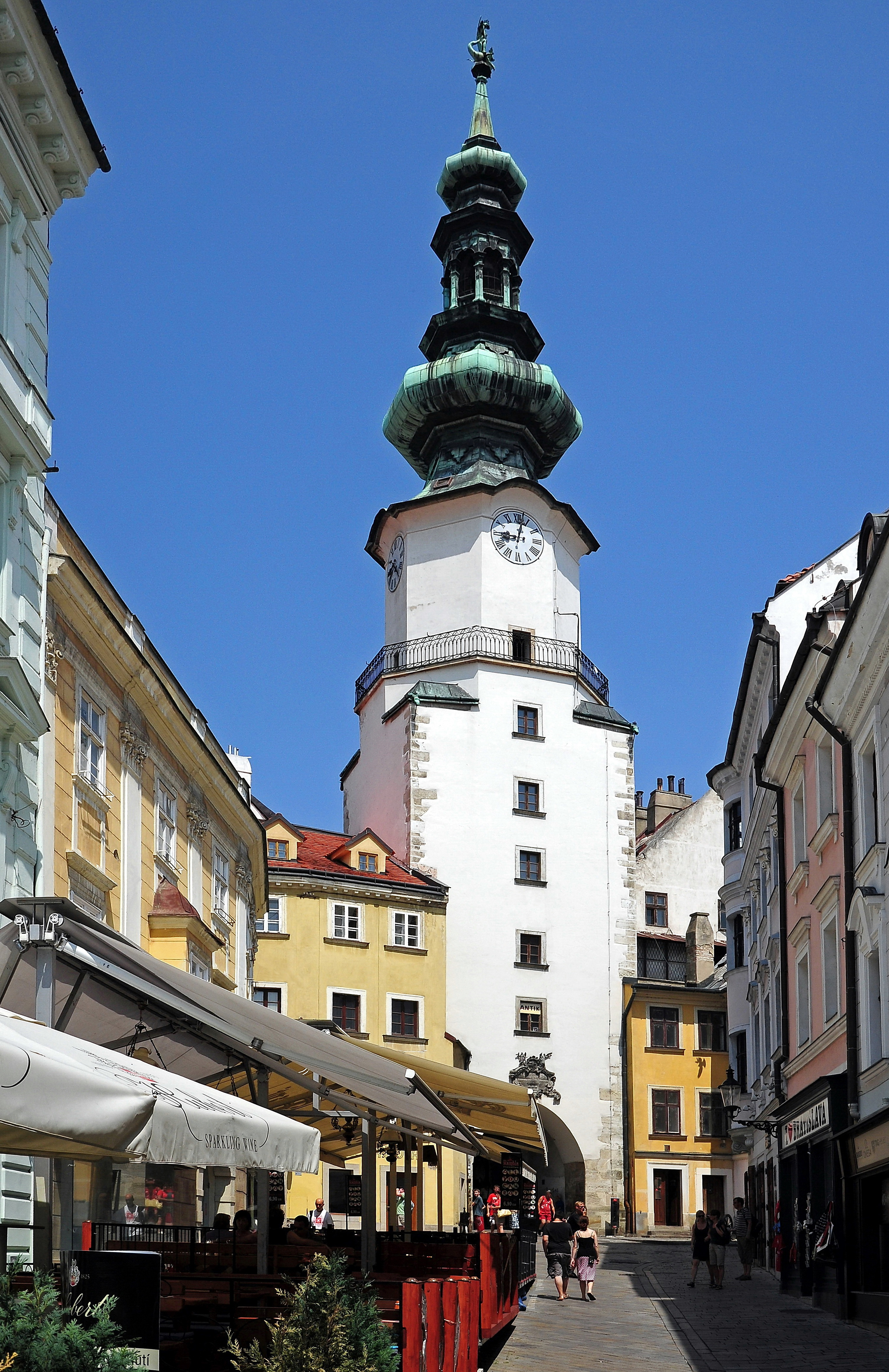 Bratislava, Michalská veža, Slovensko